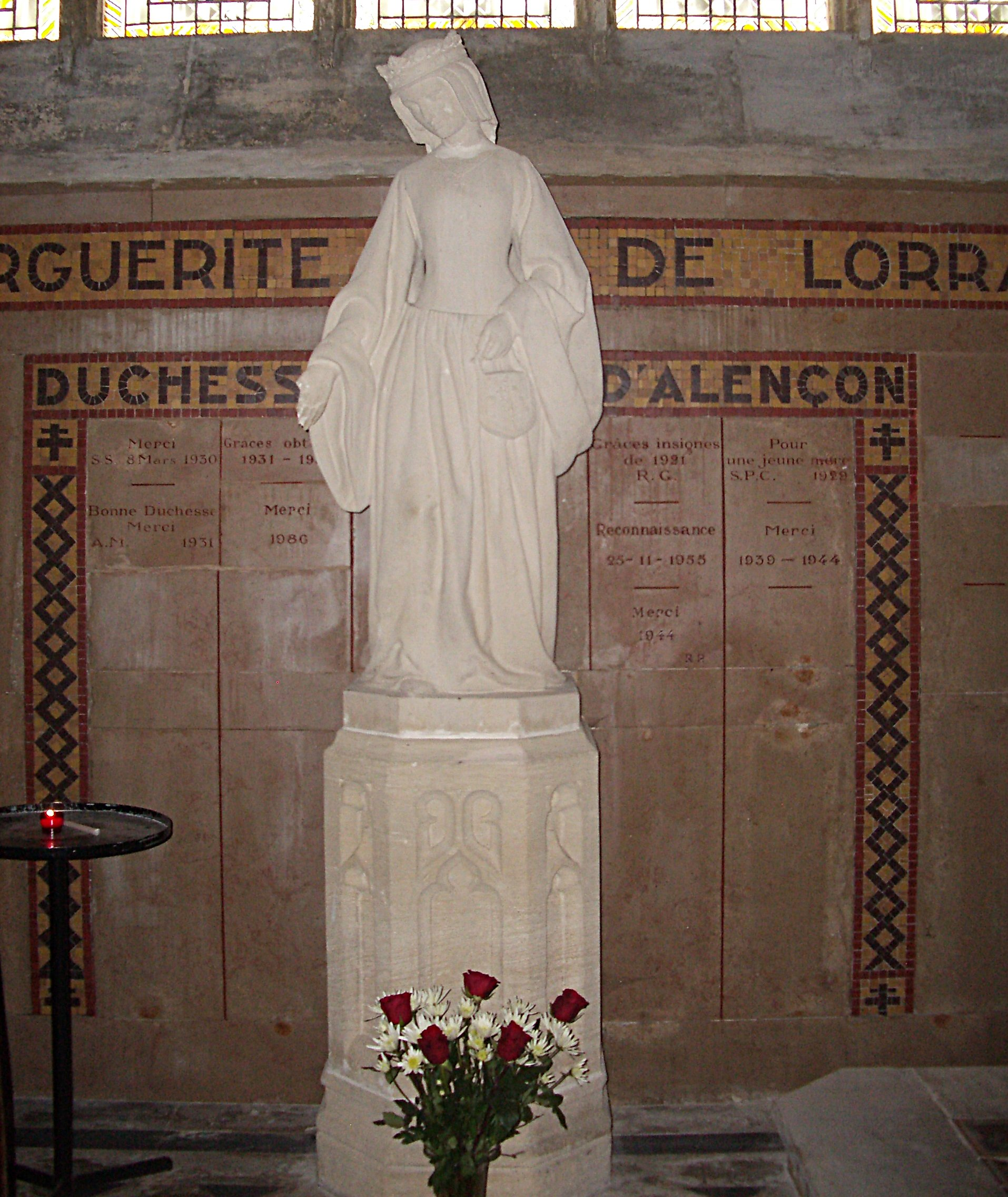 Statue de Marguerite de Lorraine dans la basilique Notre-Dame d'Alençon.